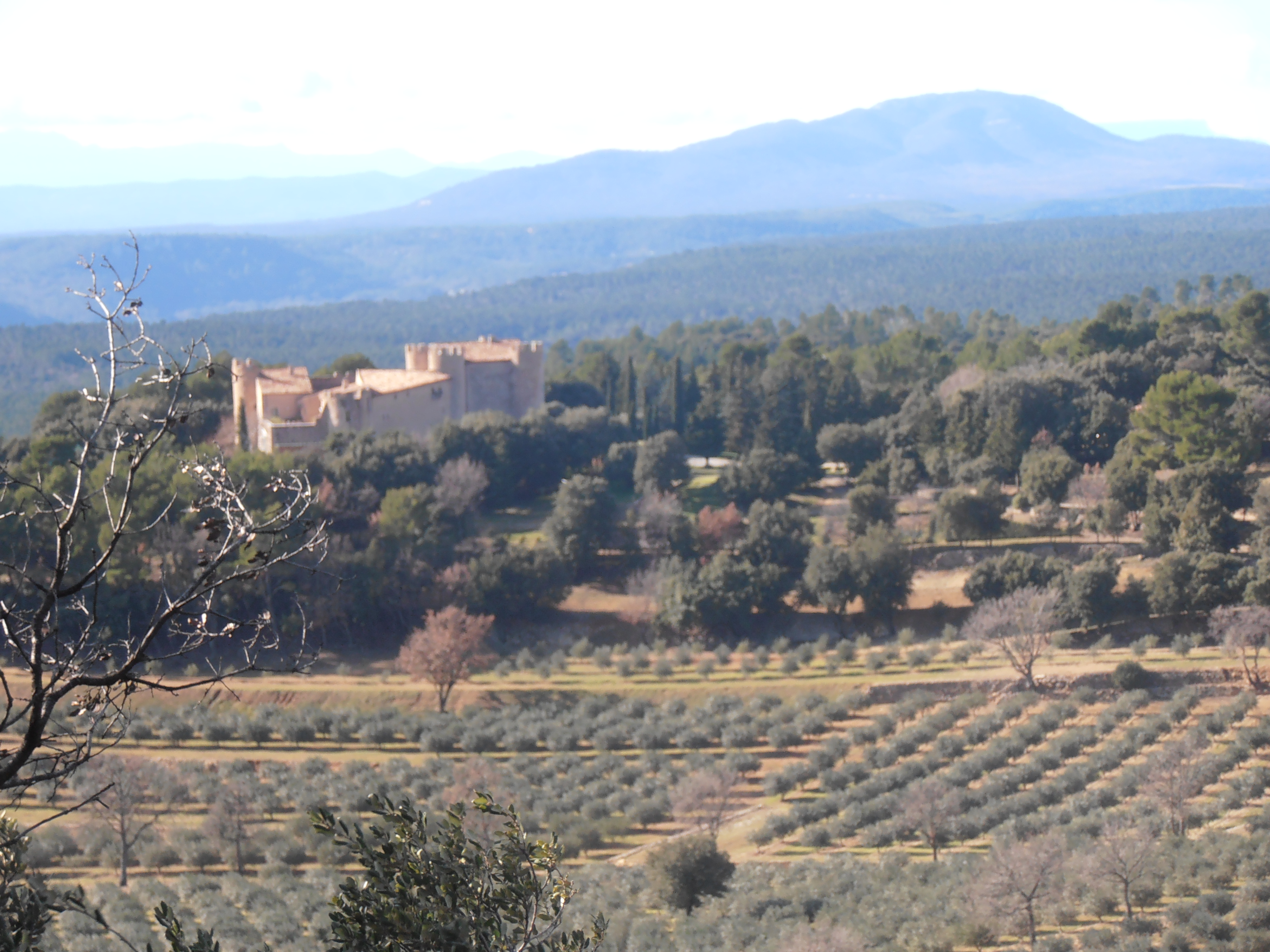 Var, Château de Taurenne, producteur d’huile d’olive AOC Provence, Aups, route de Tourtour L’exploitation du domaine oléicole « Château de Taurenne », producteur d’huile d’olive AOC Provence, s’étend sur les communes d’Aups et Tourtour, sur 253 hectares avec environ 10 000 oliviers.